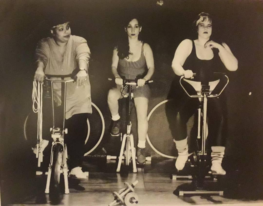 Elenco: Amadora, Perla Noguera, María Elena Alvarado, Verónica Arellano